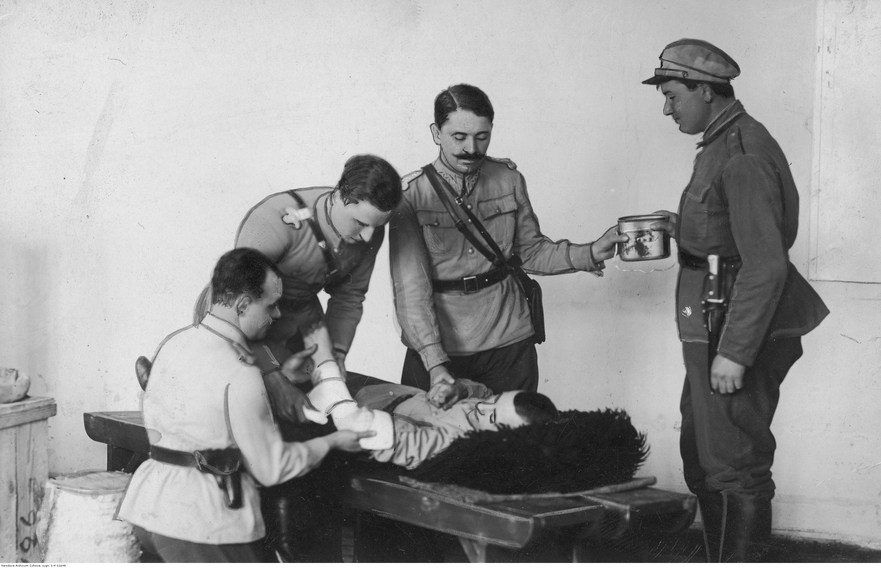 Przedstawienie "Rozkaz" w teatrze żołnierskim batalionu KOP w Podświlu; 1935 r. Koncern Ilustrowany Kurier Codzienny - Archiwum Ilustracji. Sygnatura: 1-K-11648